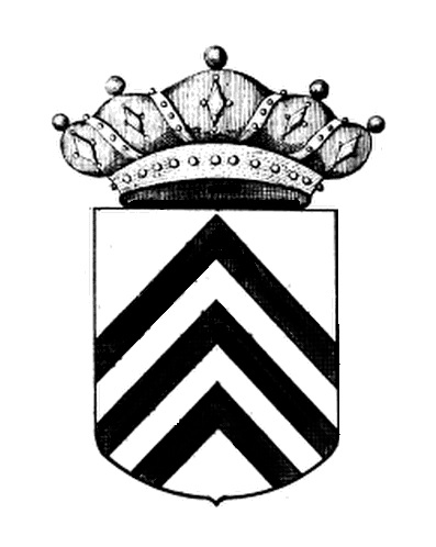 Wapenschild Baron de Grysperre